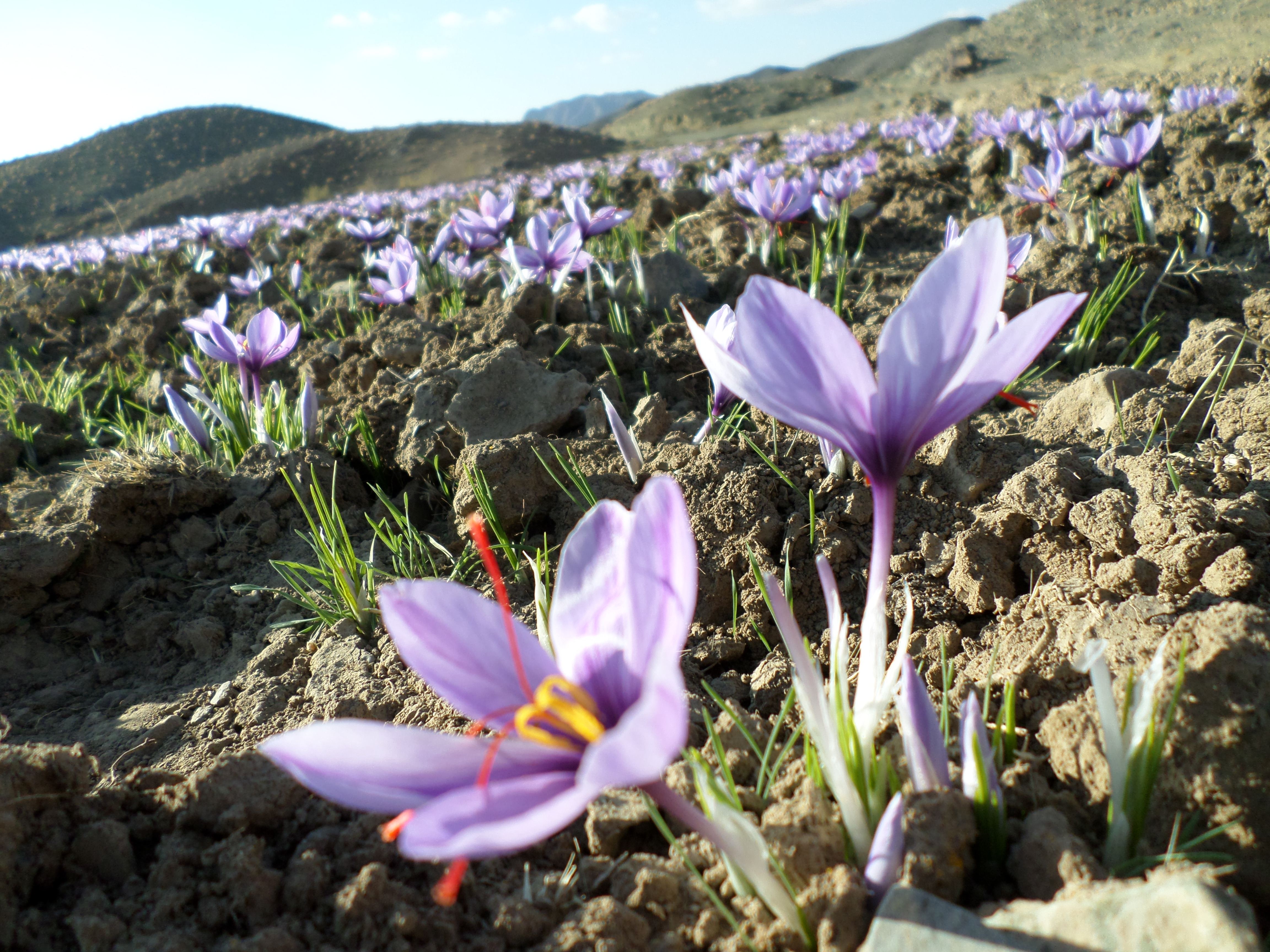 زعفران بناب مرند